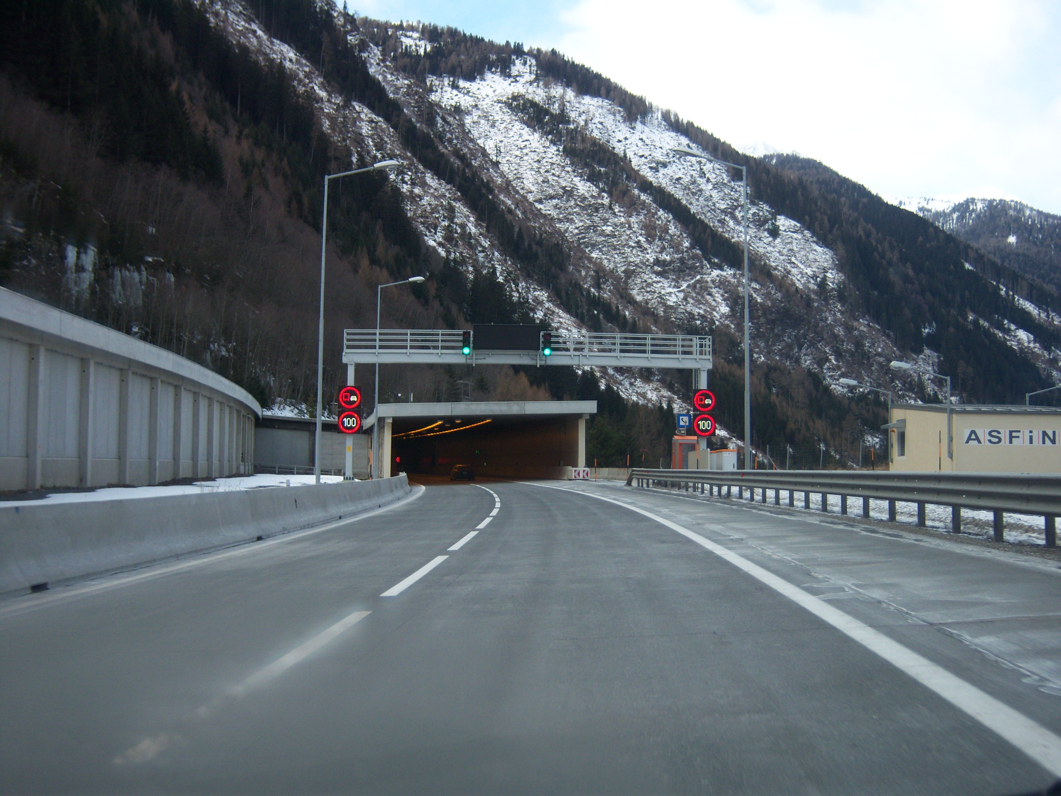 Tauern Autobahn A10 Richtung Villach vor dem Nordportal des Katschbergtunnnel